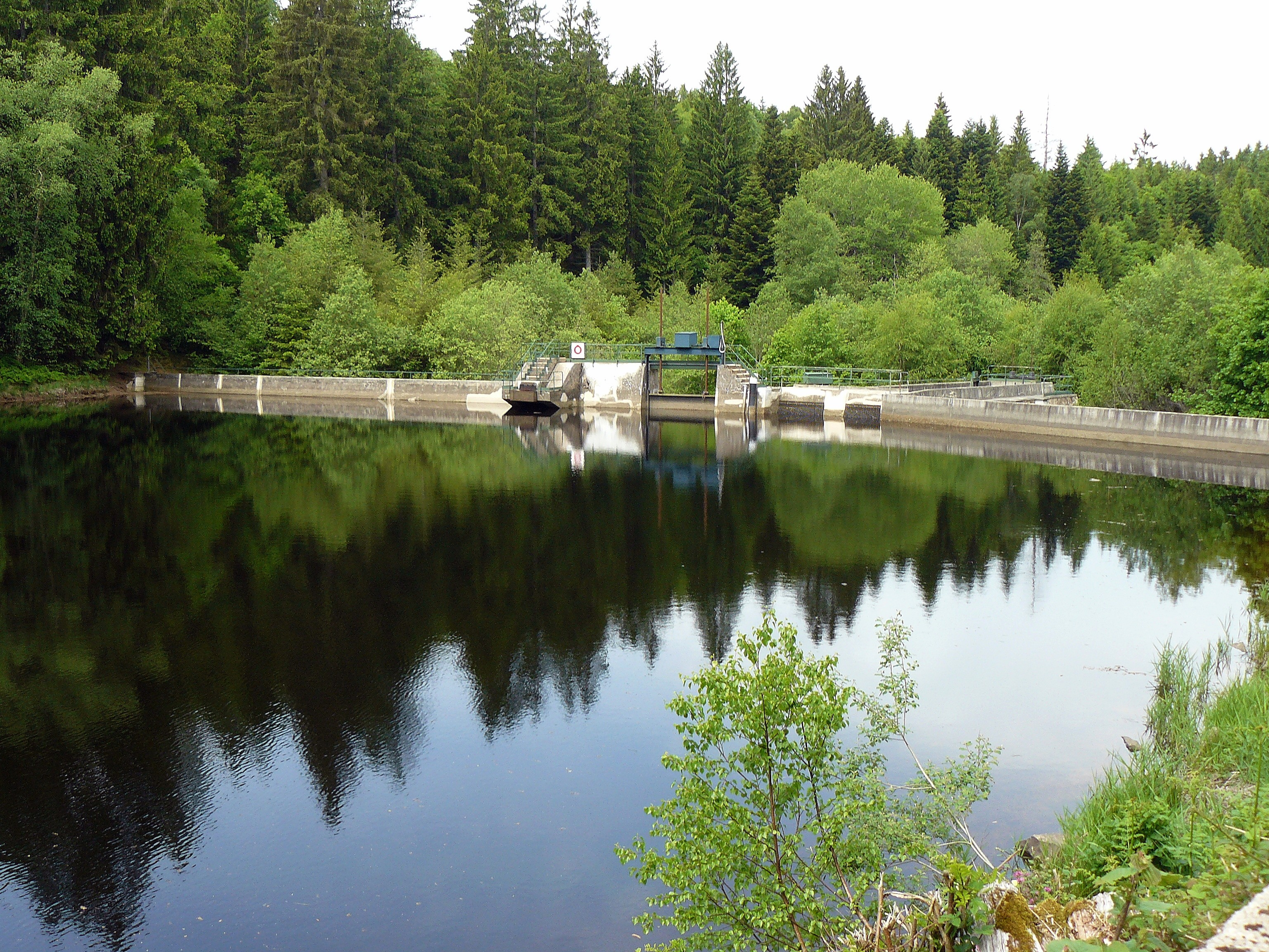 Barrage hydroélectrique sur la Canche, dans le Morvan (Saône-et-Loire, France)